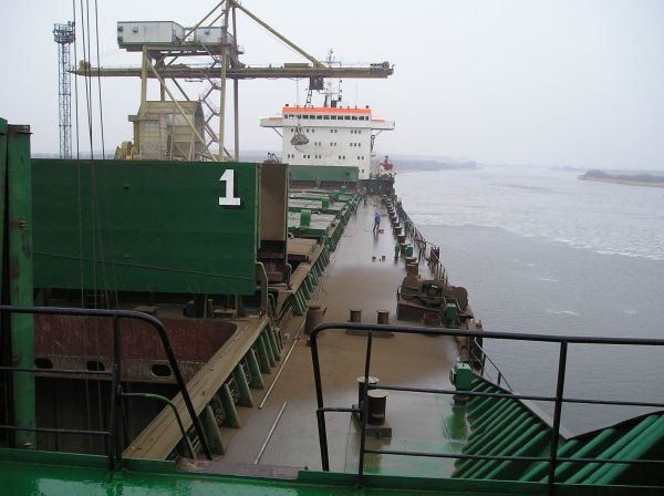 Masowiec m/v Generał Grot-Rowecki, port: Police (PL). IMO Number: 8417754 MMSI Number: 341929000 Callsign: V4DL2 Length: 199 m Beam: 28 m